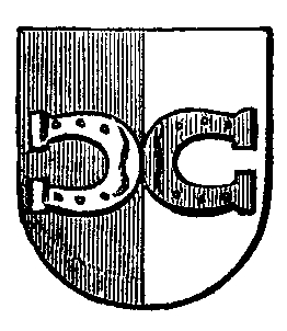 Wappen Proskaus in Oberschlesien um 1870 nach Clericus